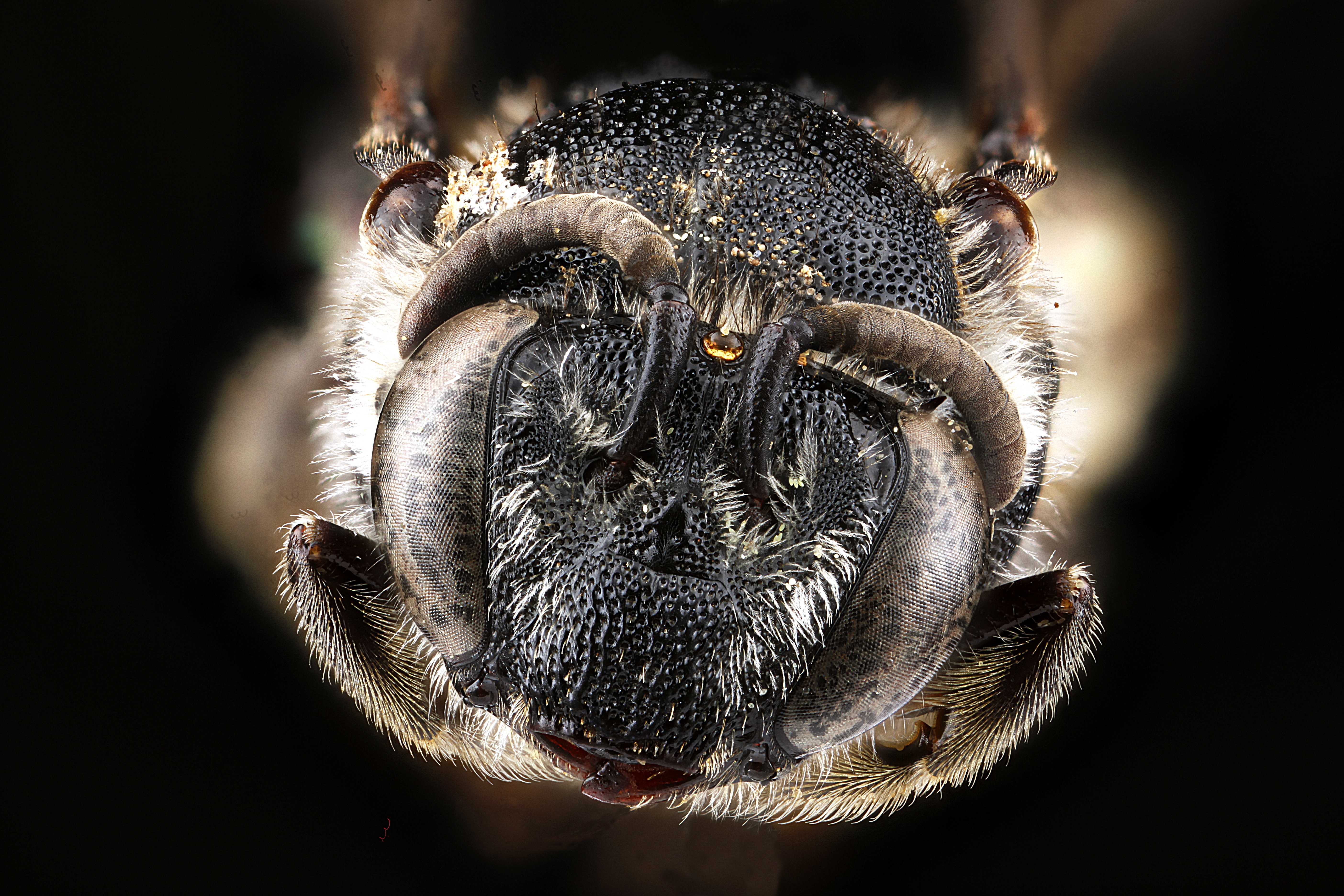 Colletes nudus, female